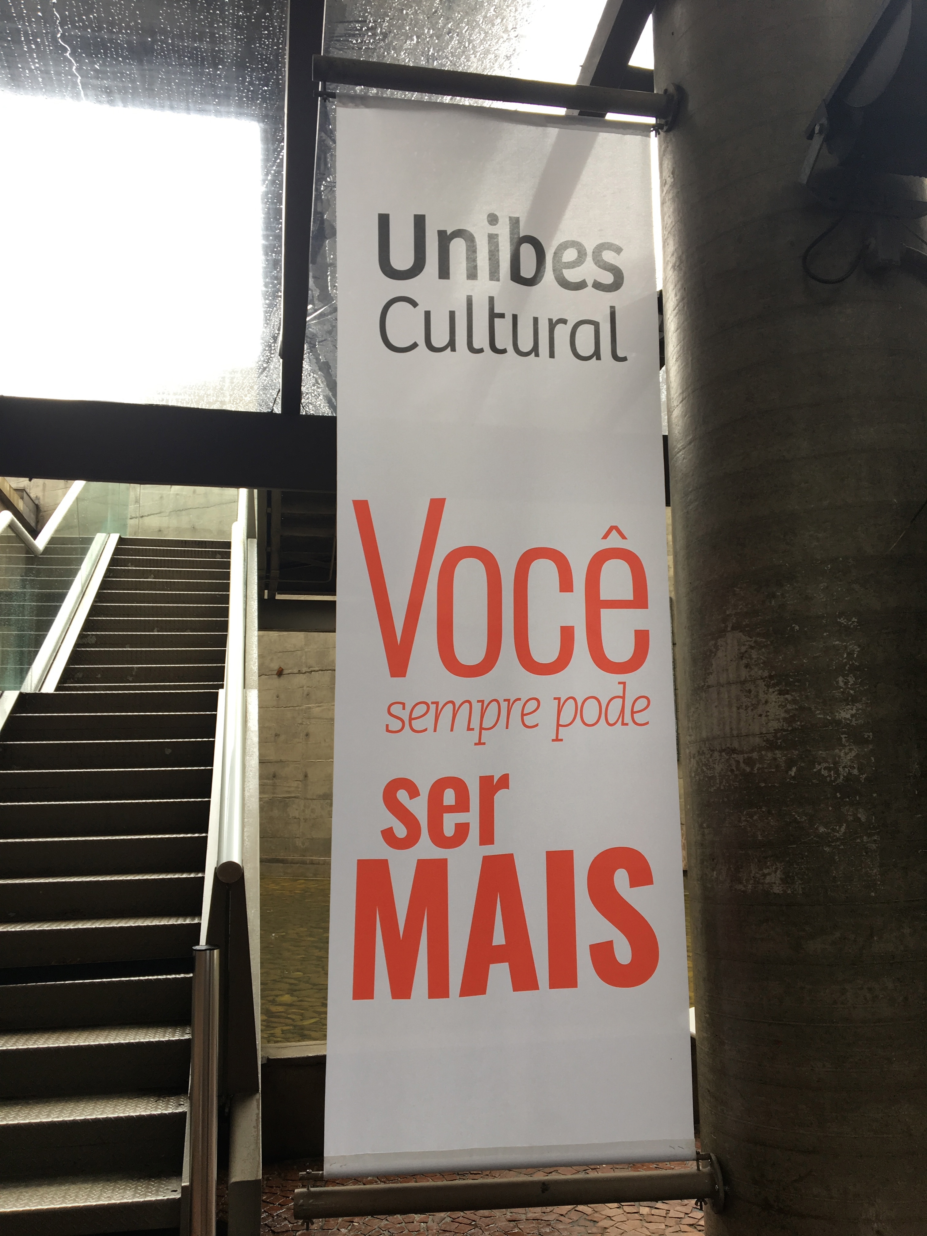 Unibes Cultural (Centro da Cultura Judaica)